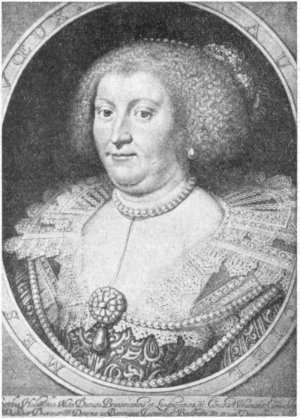 Portrait of Sophie Hedwig von Braunschweig-Lüneburg